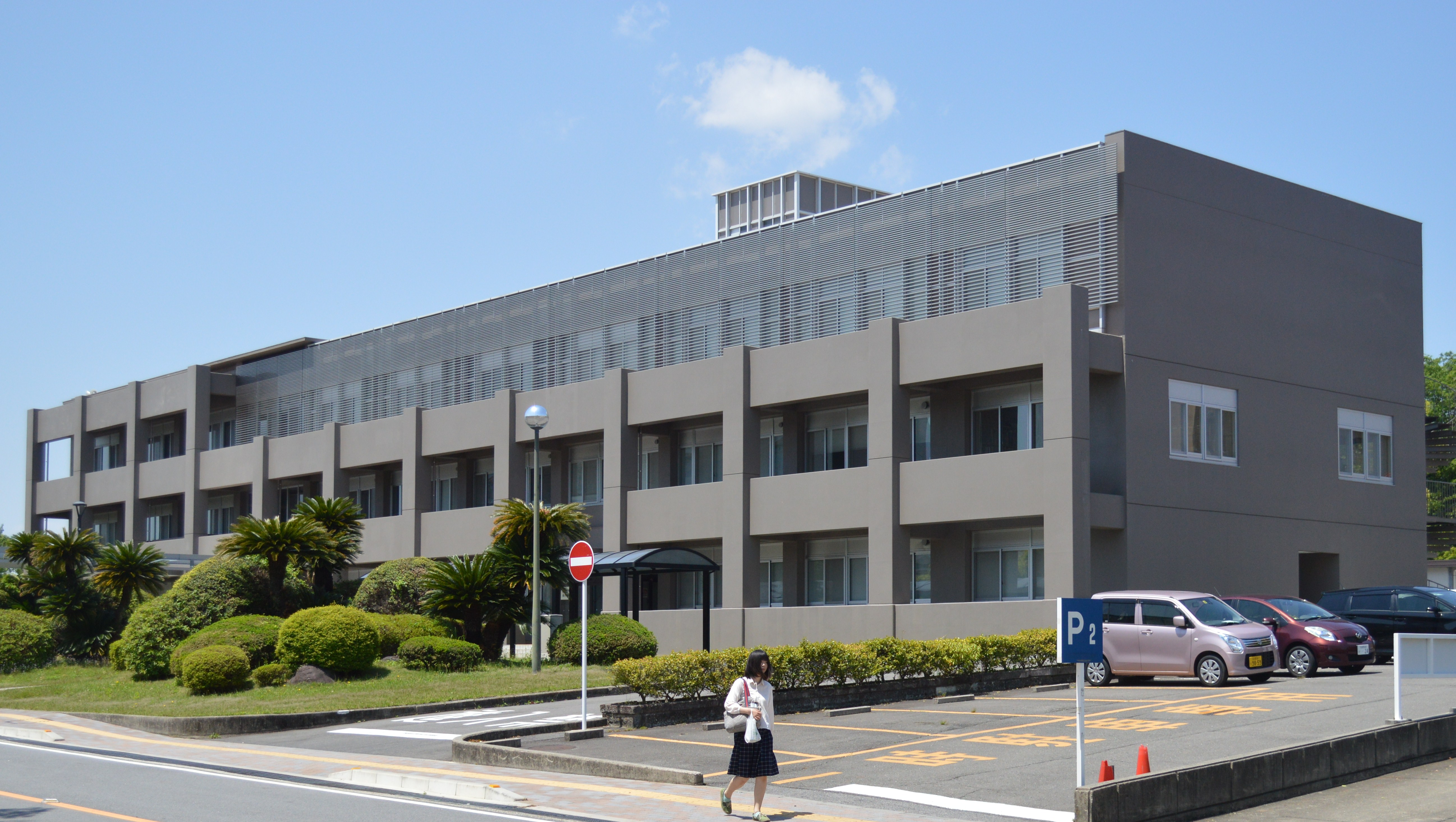 愛知教育大学の本部棟、愛知県刈谷市